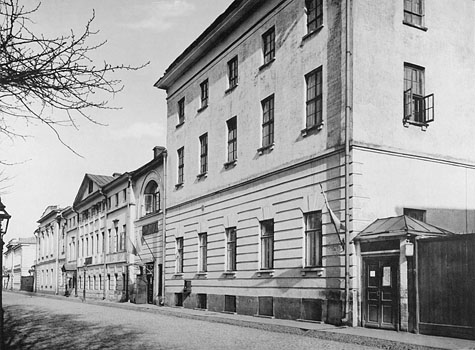 125. Домъ Трудолюбiя и Работный домъ въ Б. Хиритоньевскомъ пер.